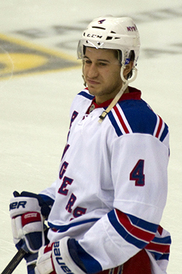 Michael Del Zotto